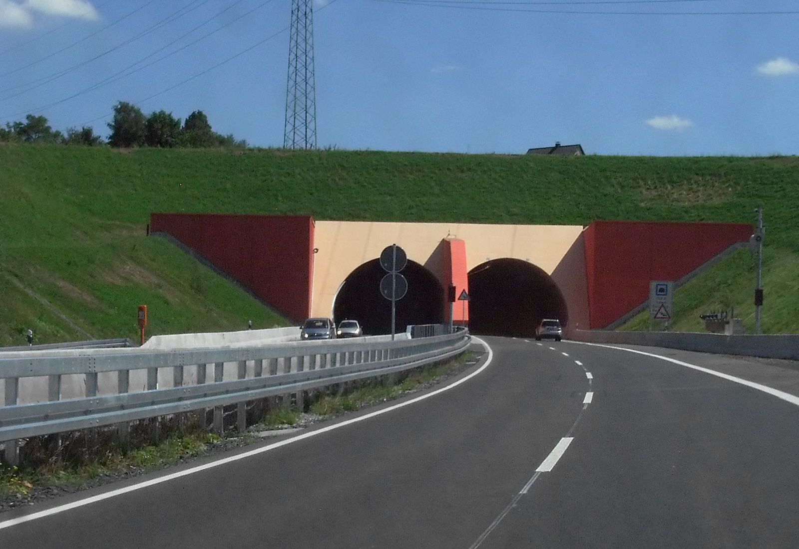 Nordportal des Tunnels Berghofen in Dortmund